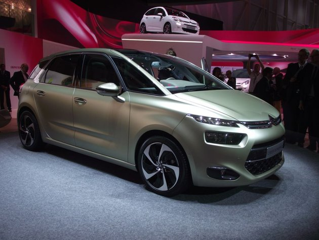 Citroen C4 Picasso II